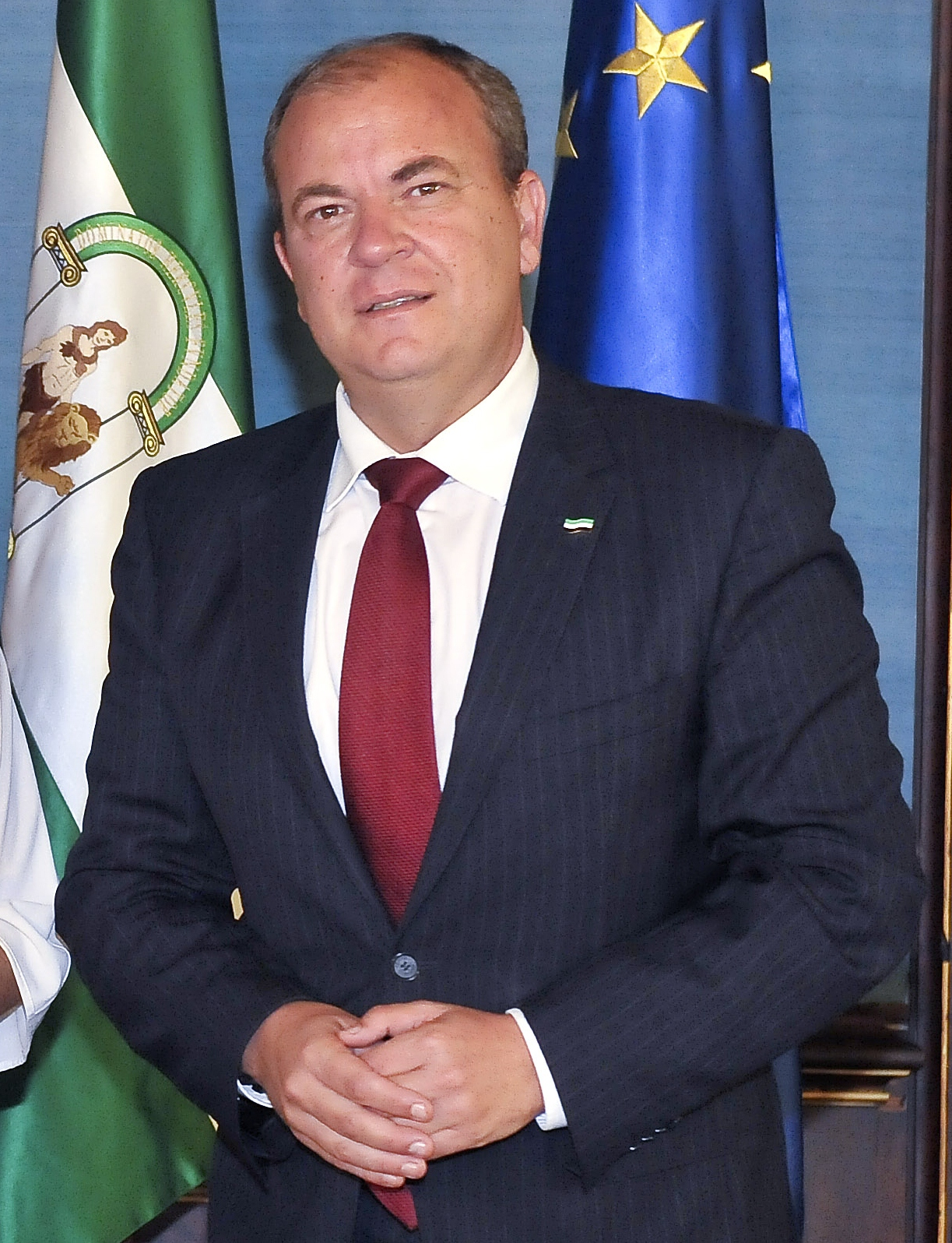 José Antonio Monago en 2013